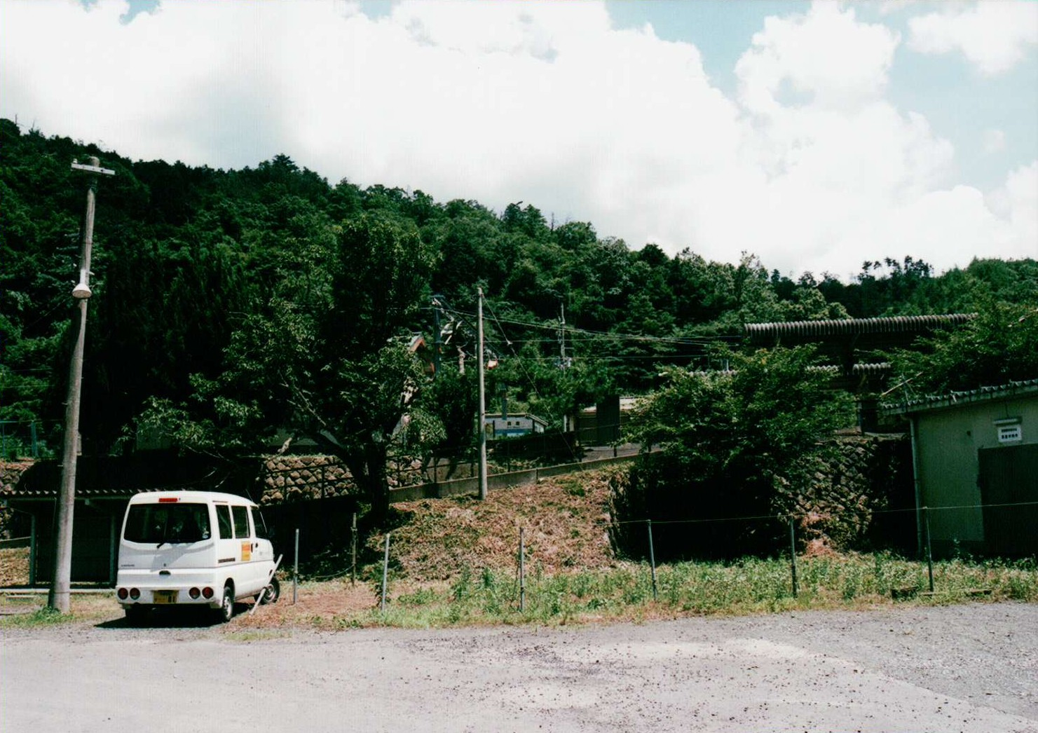 真倉駅(2010/07/17)